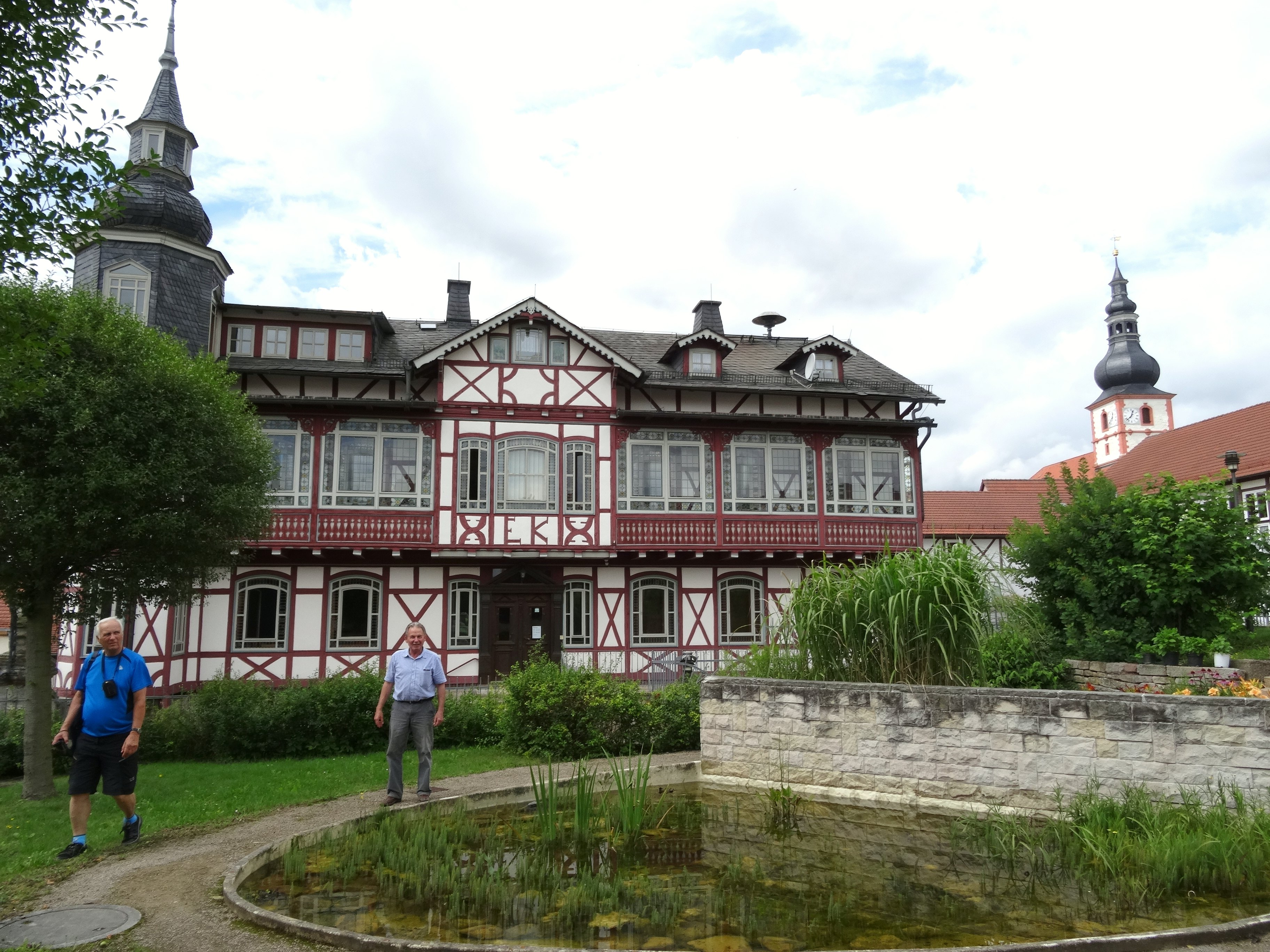 das ehemalige Rote Schloss in Helmershausen, heute Gemeindeverwaltung und Dorfbibliothek